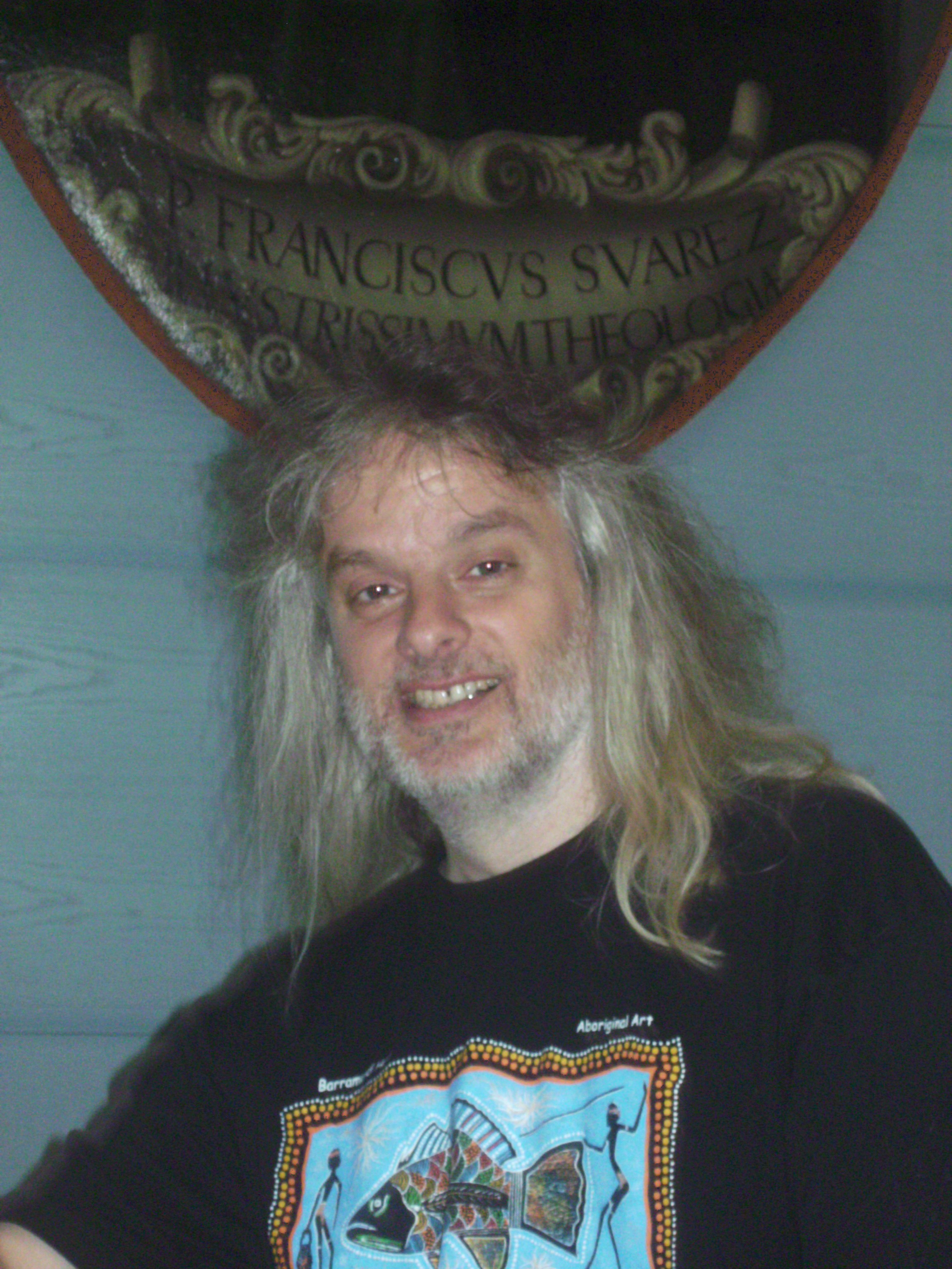 David Chalmers an der Hochschule für Philosophie 2011